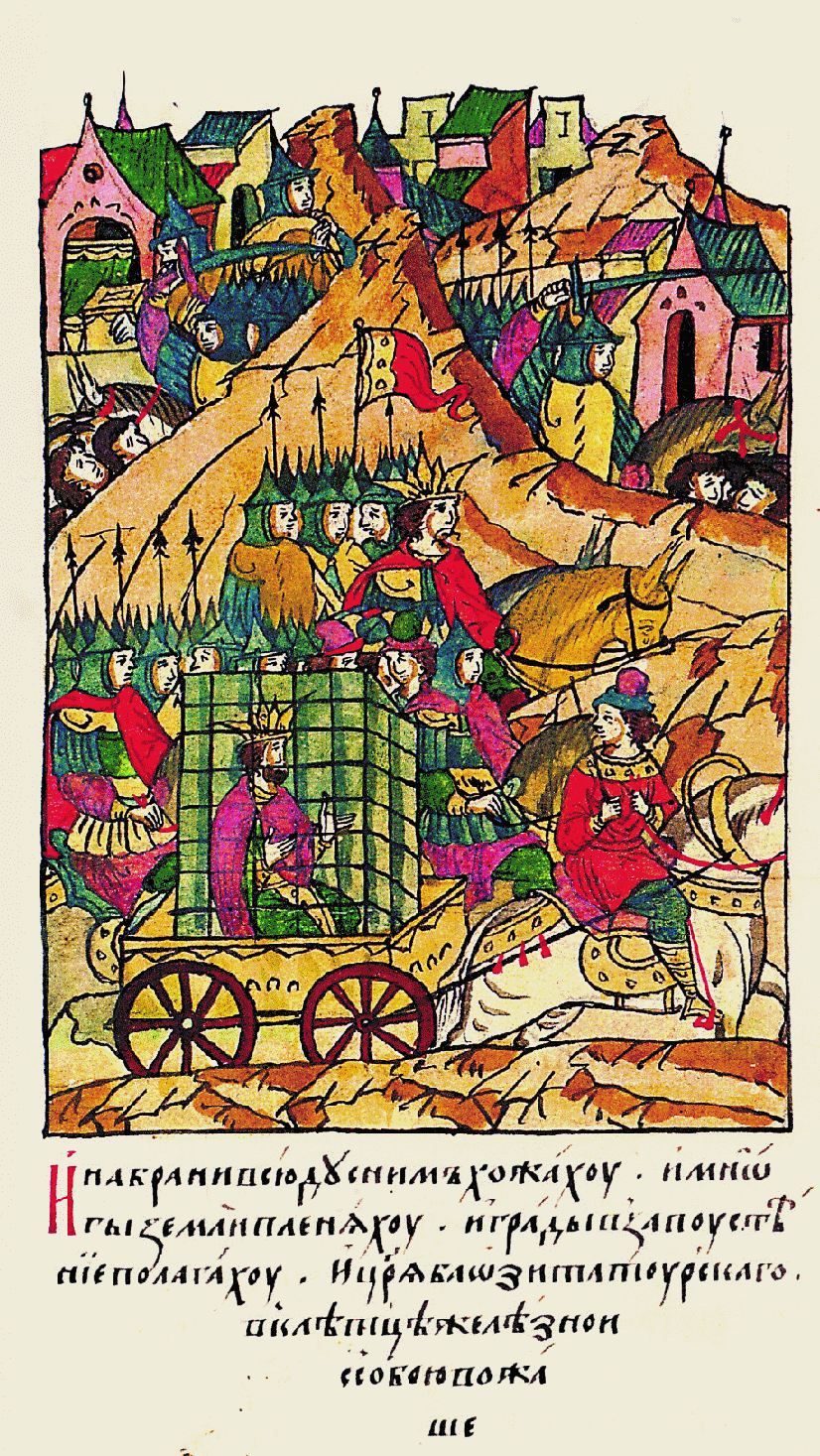 и на войну всюду с ним ходили, многие земли пленяли и горо- да в запустение при- водили. Царя Турецко- го Баозита в железной клетке с собой возил.